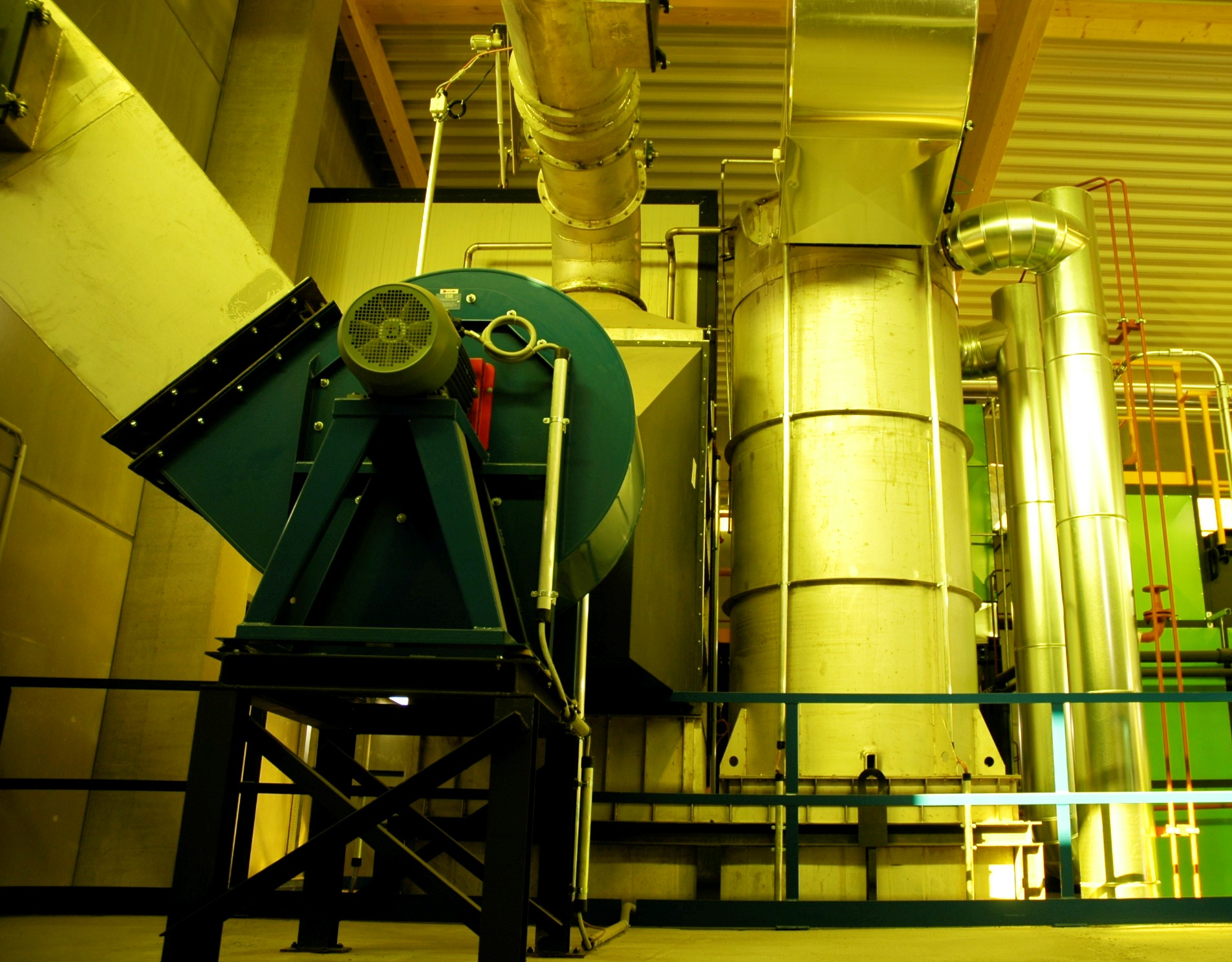 Rauchgaskondensationsanlage eines Biomasseheizwerkes der EVN Wärme in Maria Gugging; rechts der Entschwadungsluftventilator der die Luft durch den Glaswärmetauscher der Kondensation saugt, links der Wärmetauscher der die Kondensationswärme in das Fernwärmenetz noch abgibt